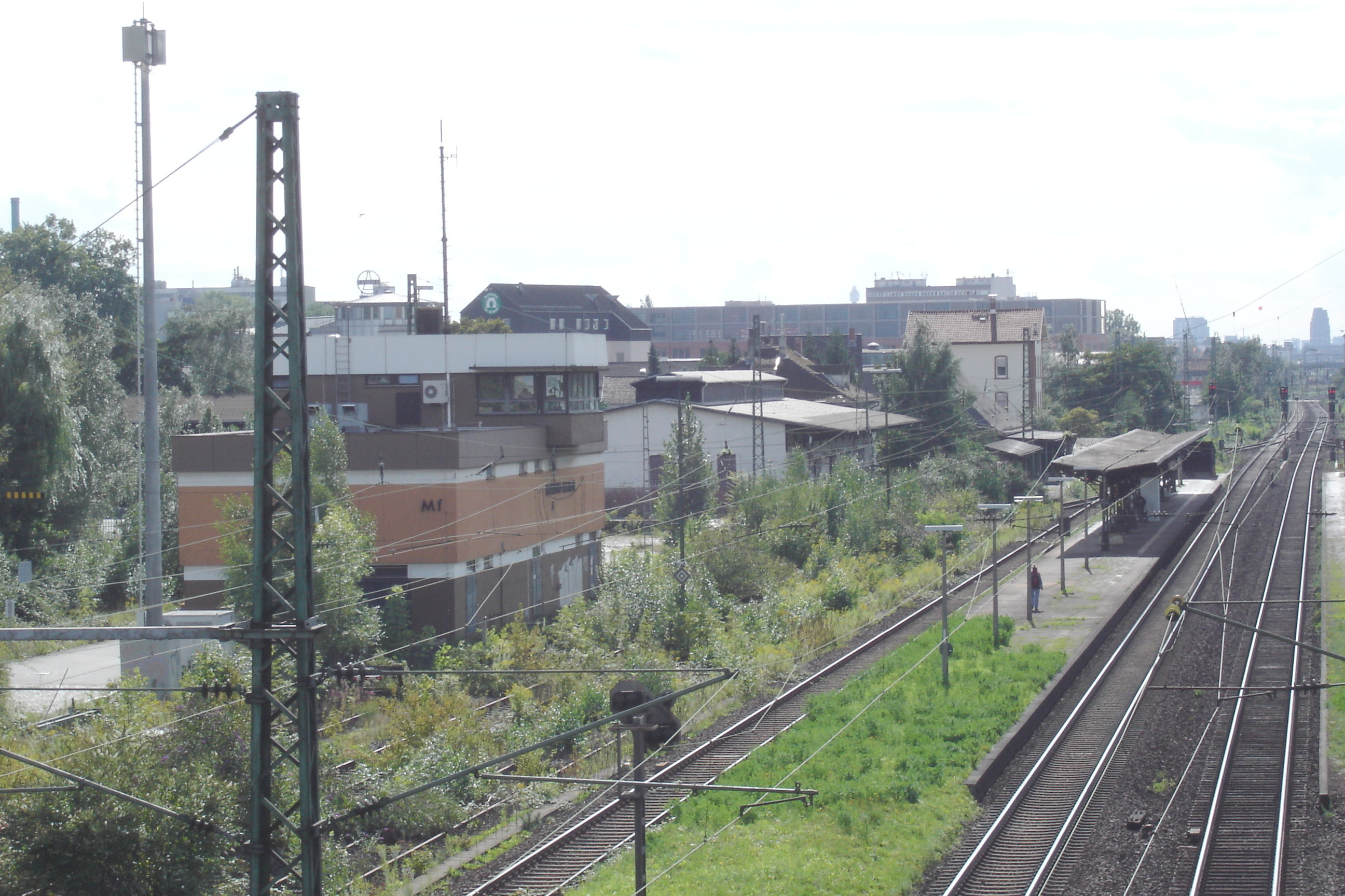 Bahnhof Mainkur incl. Stellwerk